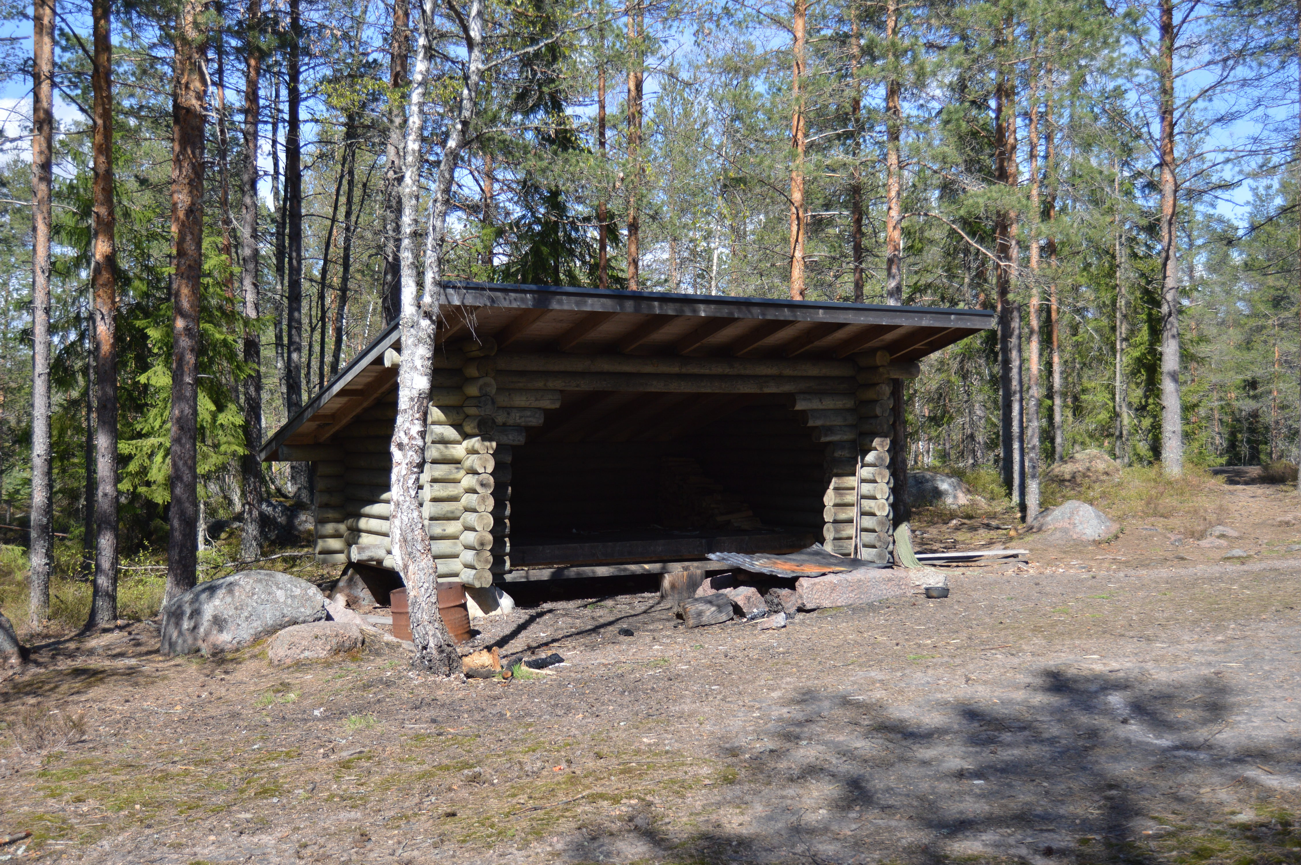 Suurvuoren laavu Haminan Reitkallissa